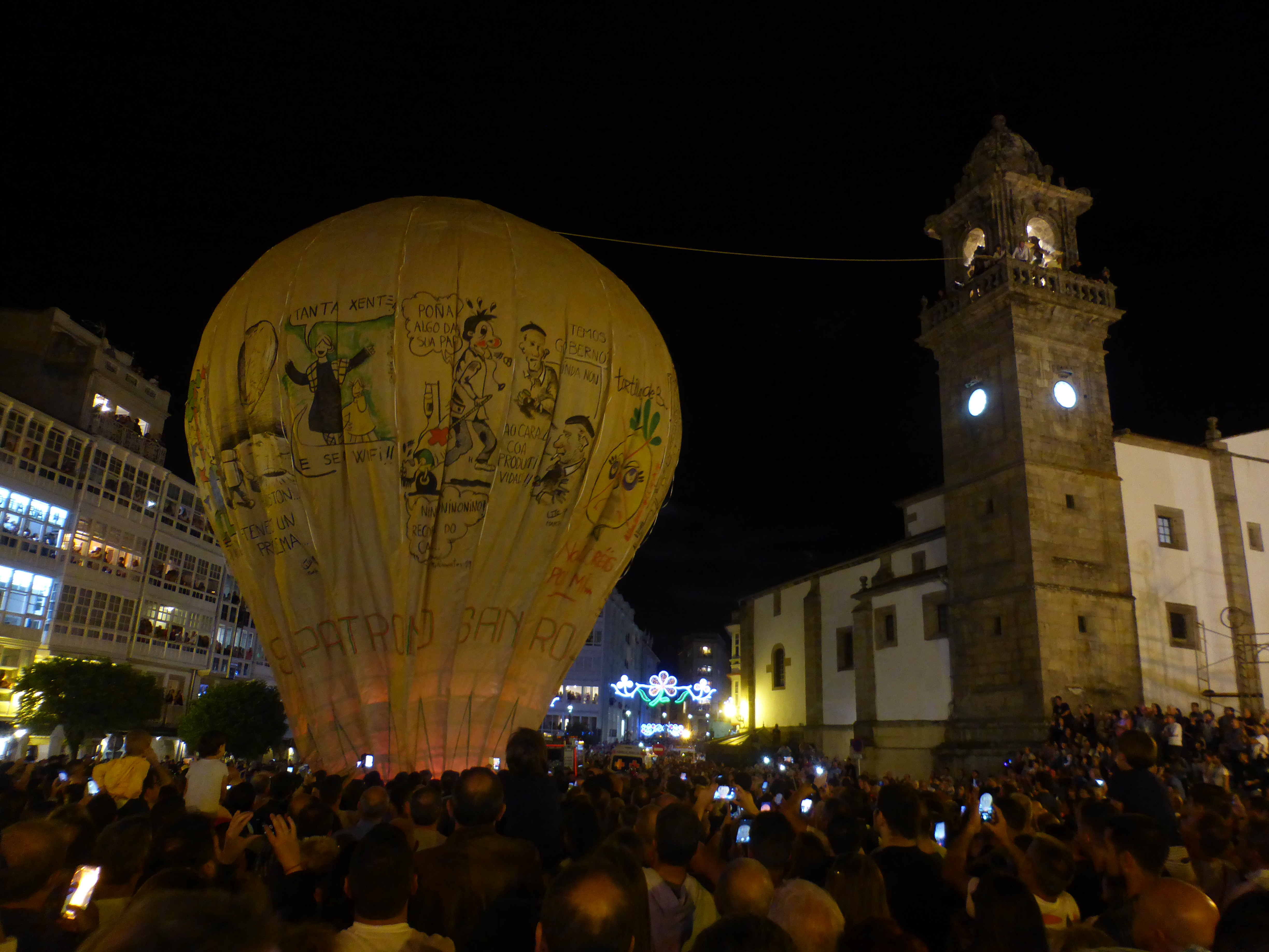 Inflado del globo junto al campanario de la iglesia de Santo Domingo, de Betanzos.